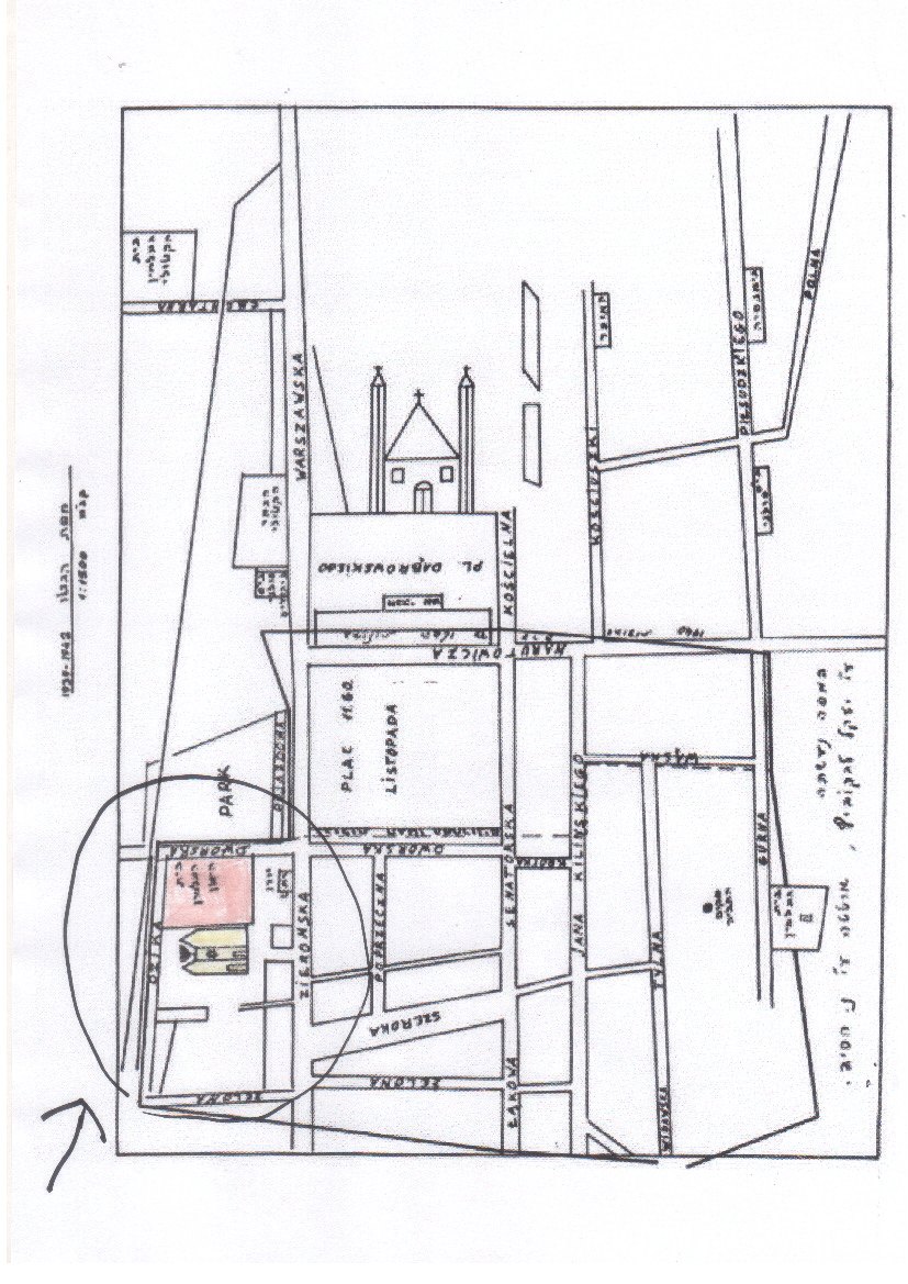 עלמין